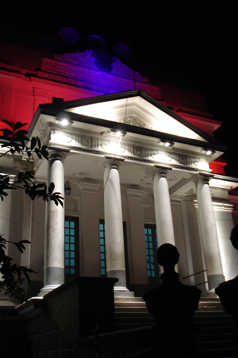 Colegio de San Luis Gonzaga (1927), Cartago - Costa Rica